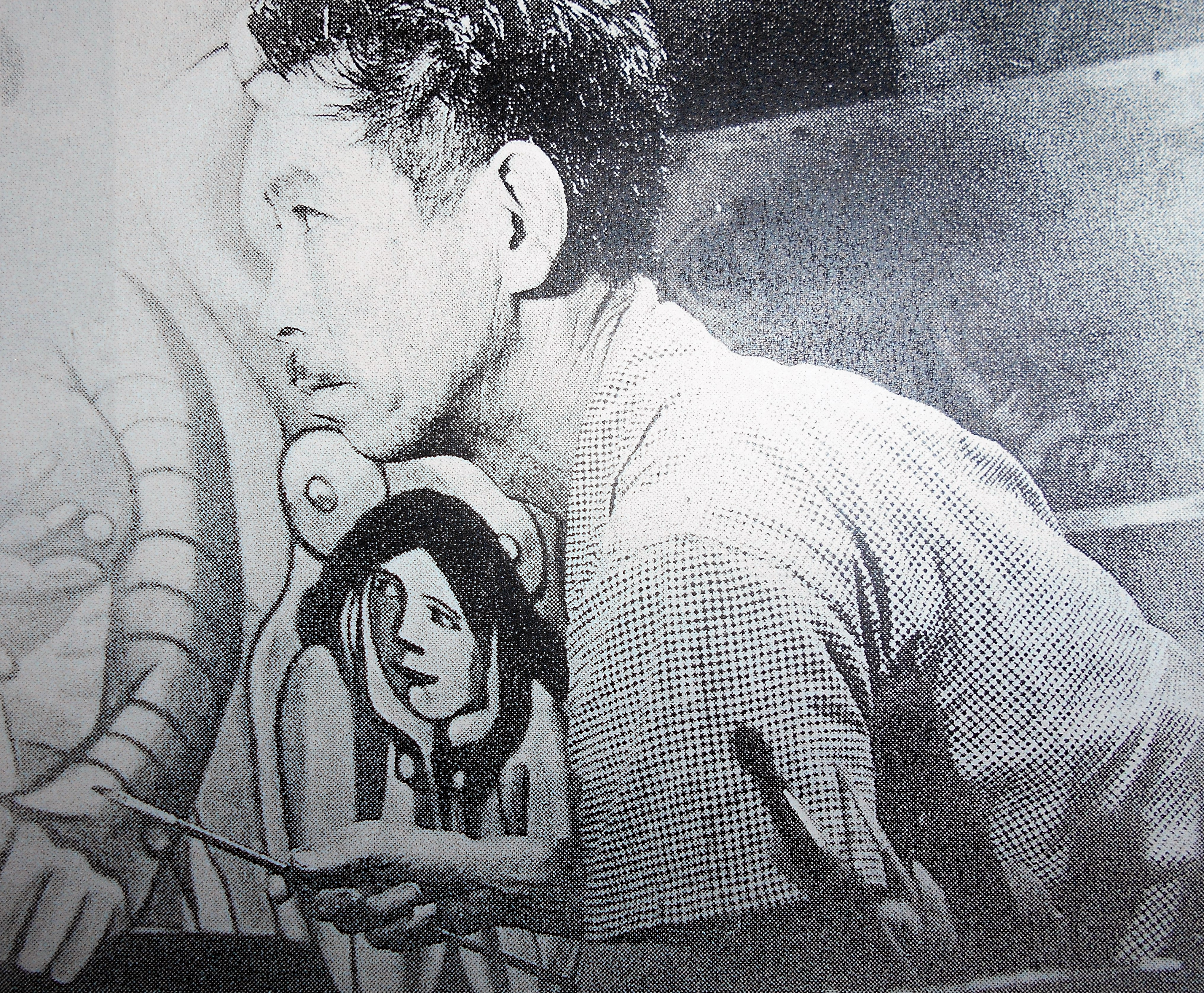 『女のつどい』を製作中の北川民次。